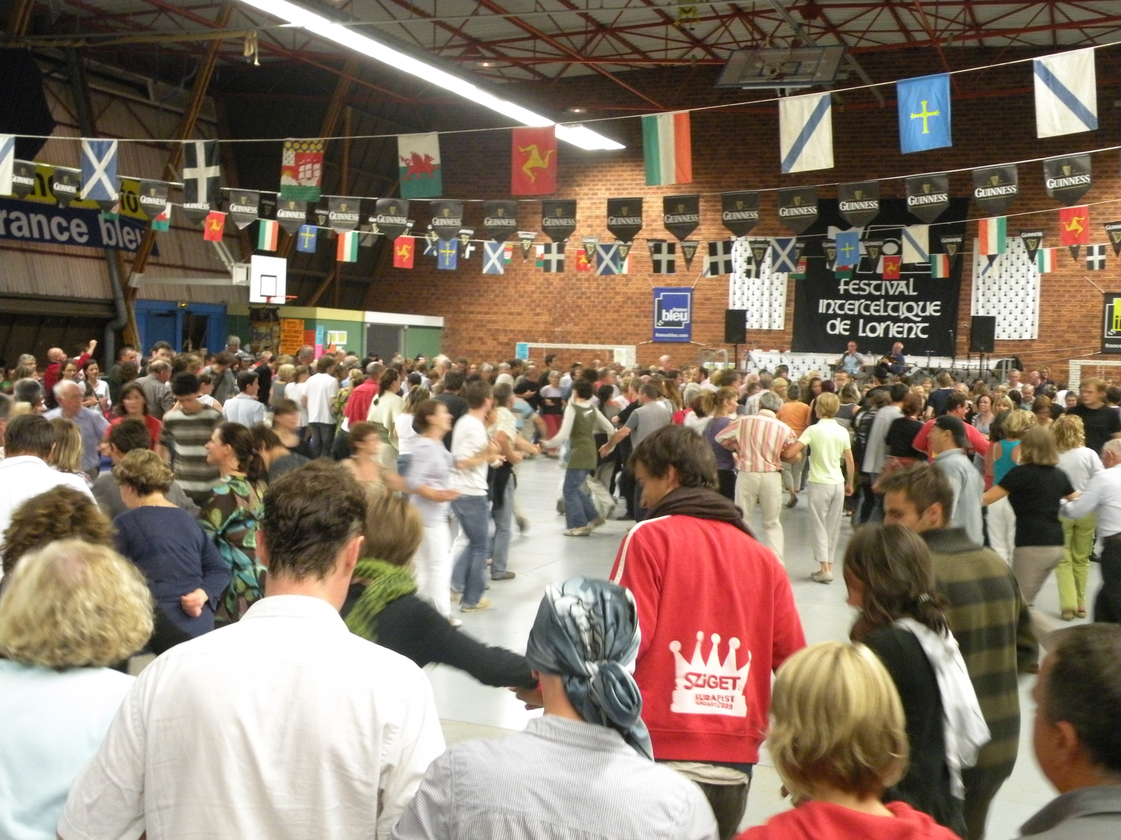 Fest-noz er sal Carnot, Emvod ar Gelted, An Oriant, 14 a viz Eost 2010.